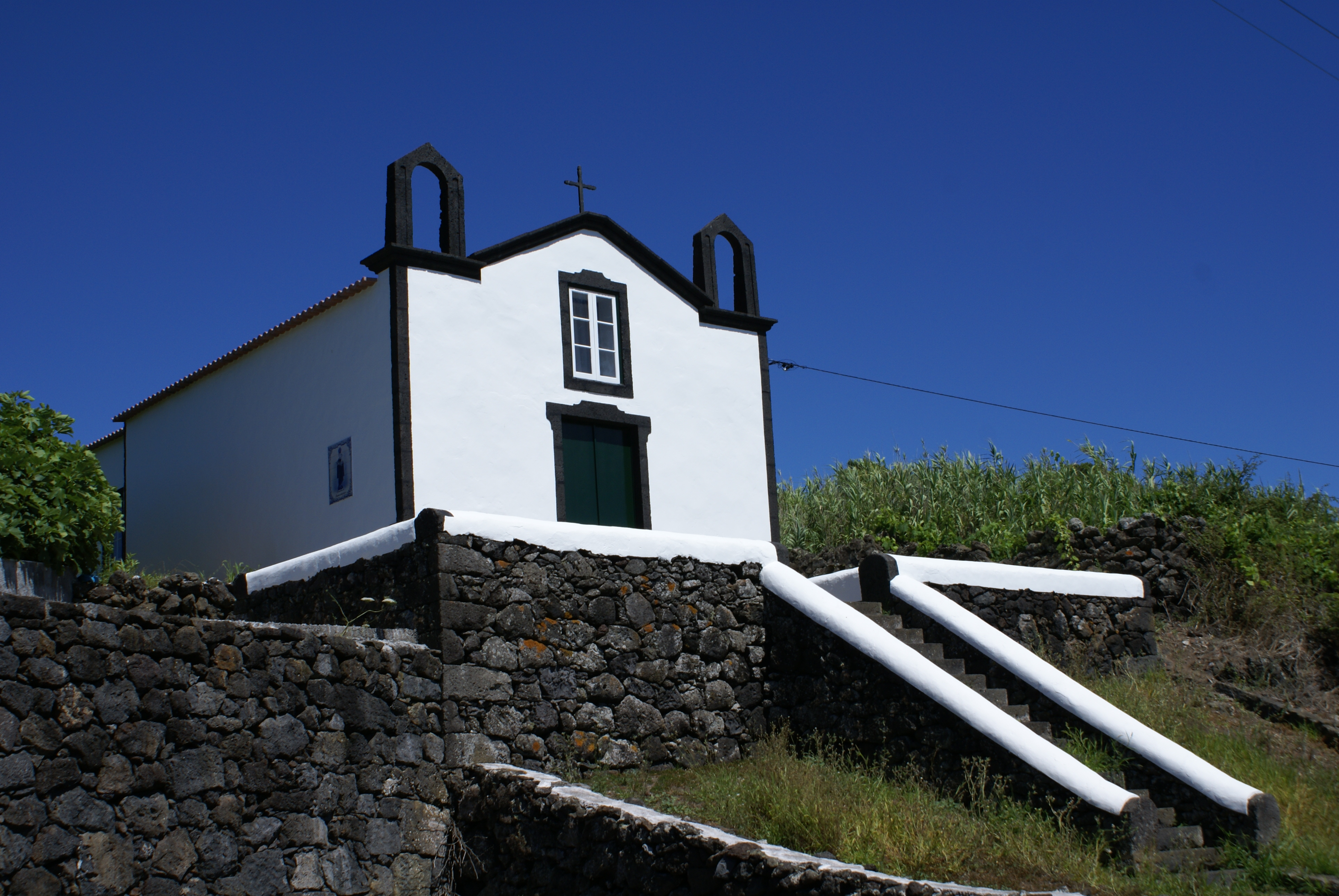 Ermida de Santo António, Baía da Folga, Santa Cruz da Graciosa, ilha Graciosa, Açores, Portugal